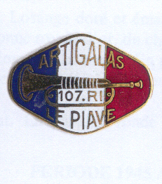 insigne régimentaire du 107e régiment d'infanterie